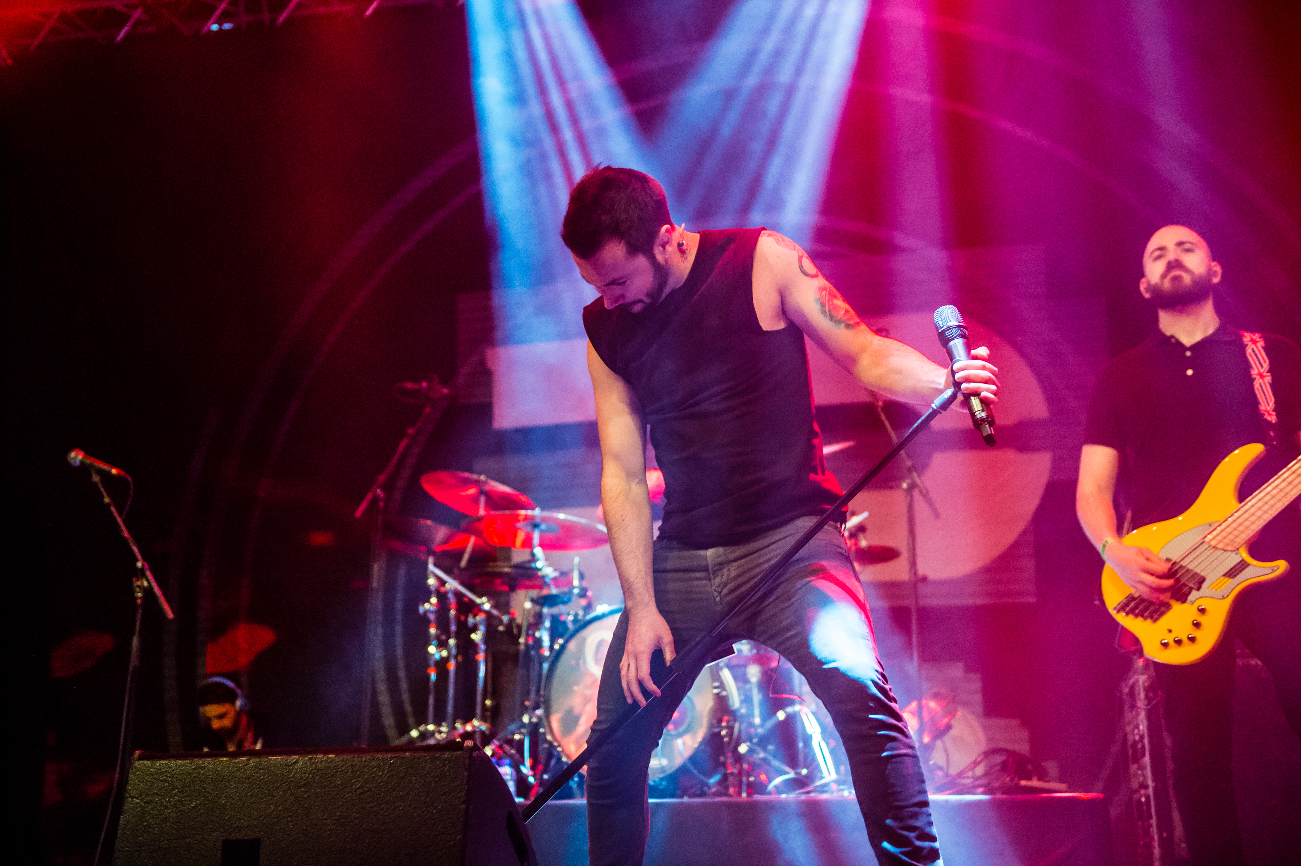 'Periphery - Epic Metal Fest - Eindhoven'